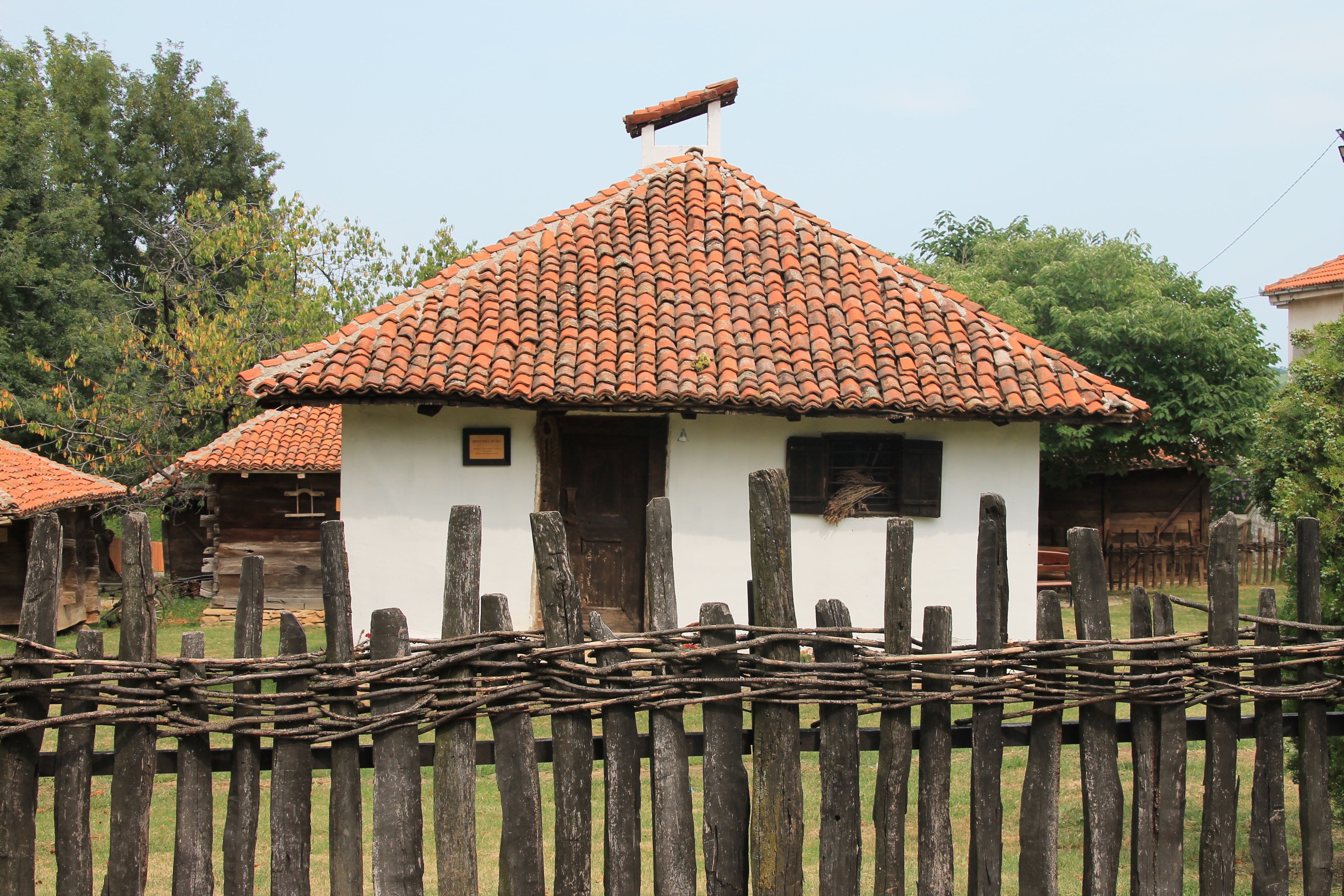 Etno selo Čumić